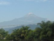 El Pico de Orizaba o Monte de la estrella (Citlaltépetl) desde Fortín de las Flores.